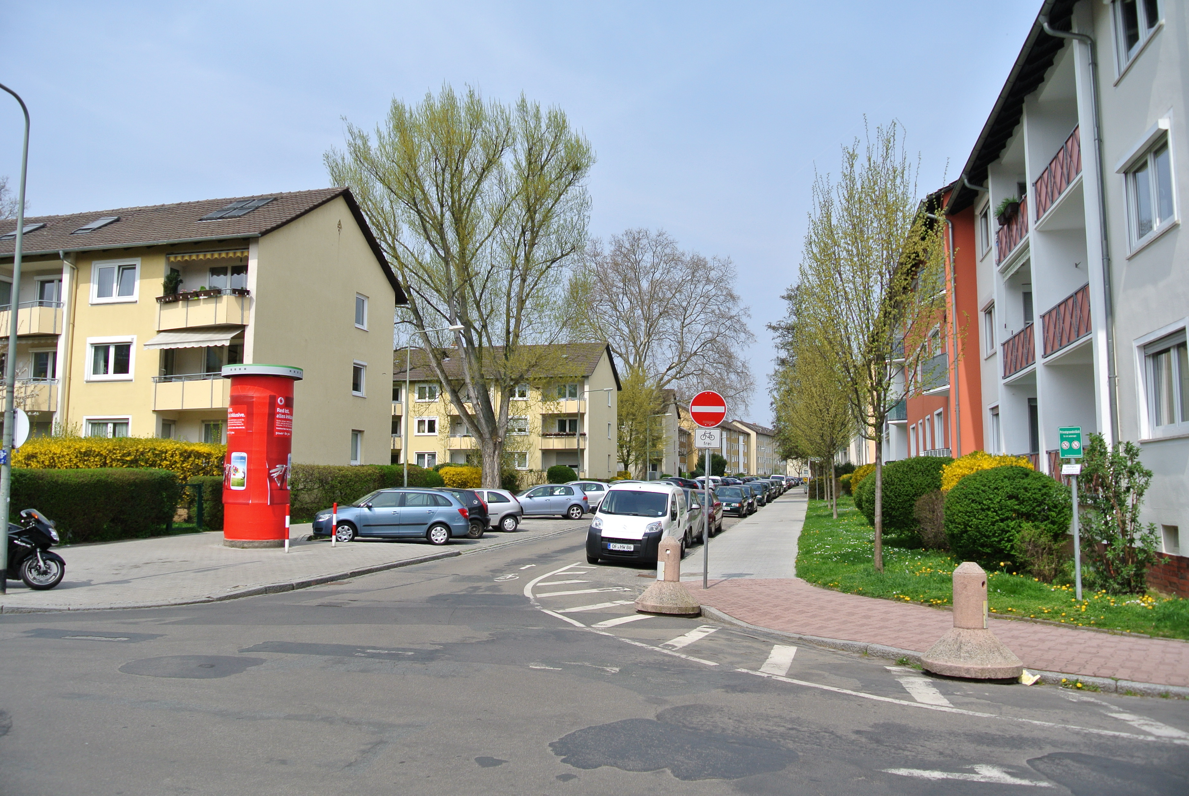 Dornbusch-Siedlung, Carl-Goerdeler-Straße nach Norden geblickt